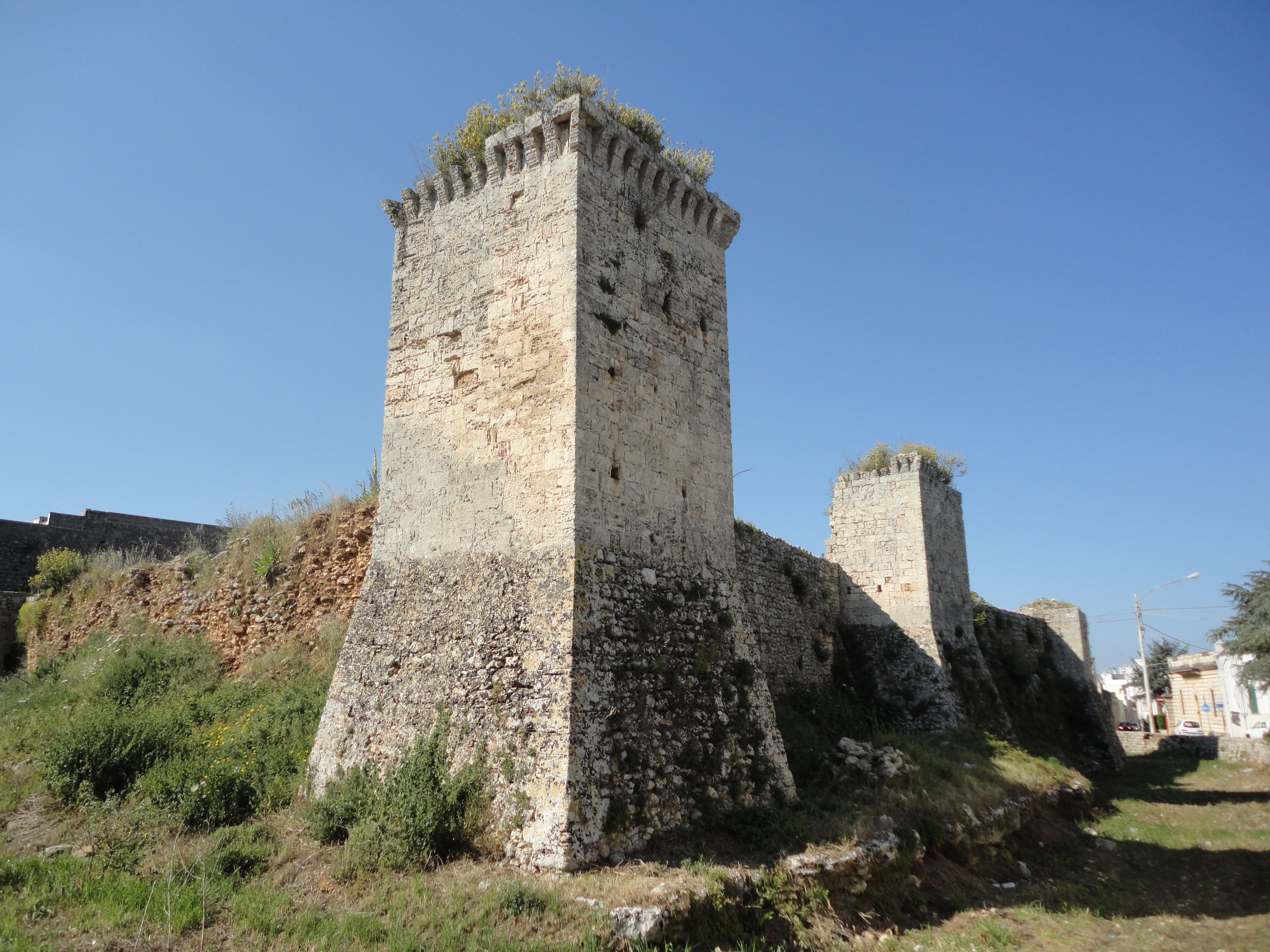 Castello di Tutino, Tricase, Lecce